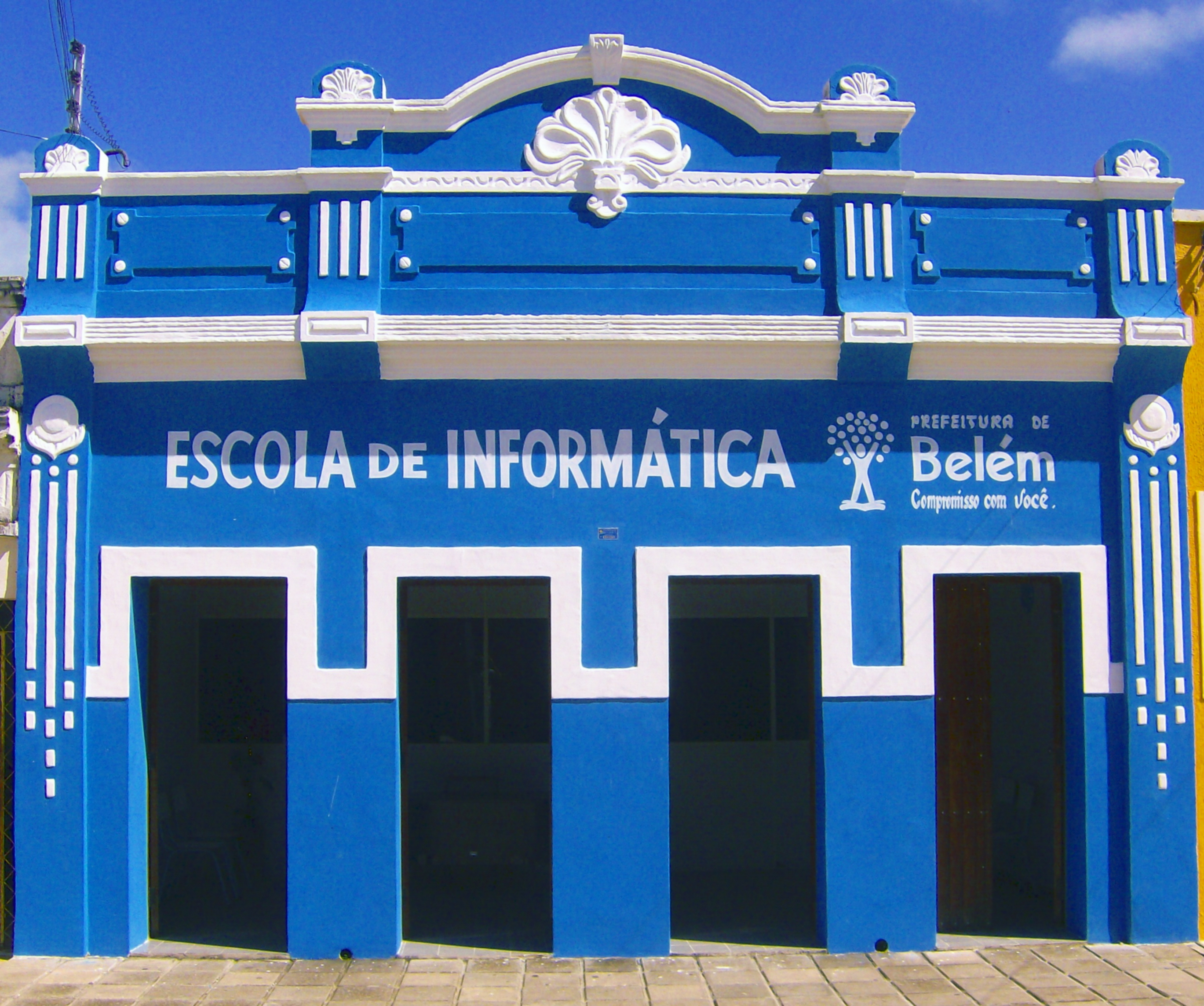 Escola de Informática do Município de Belém, estado da Paraíba.